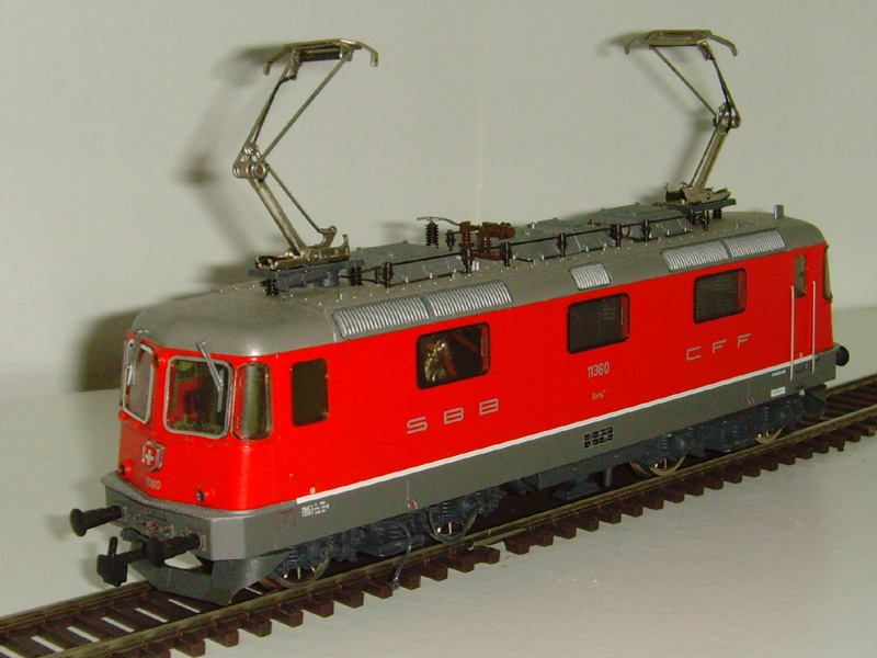 Lokomotiva výrobce HAG v H0